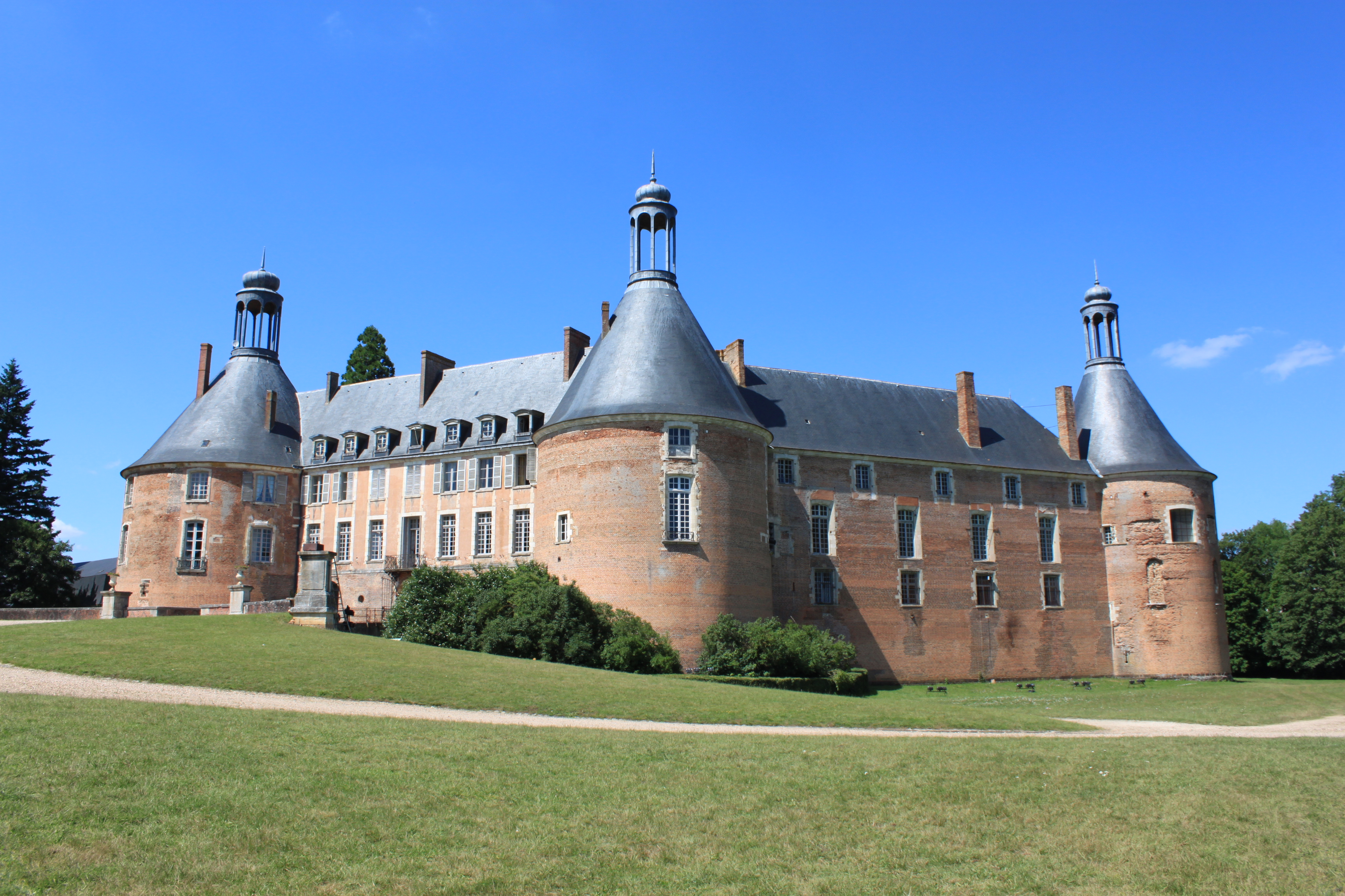 Château de Saint-Fargeau, Saint-Fargeau, Yonne, Bourgogne, France